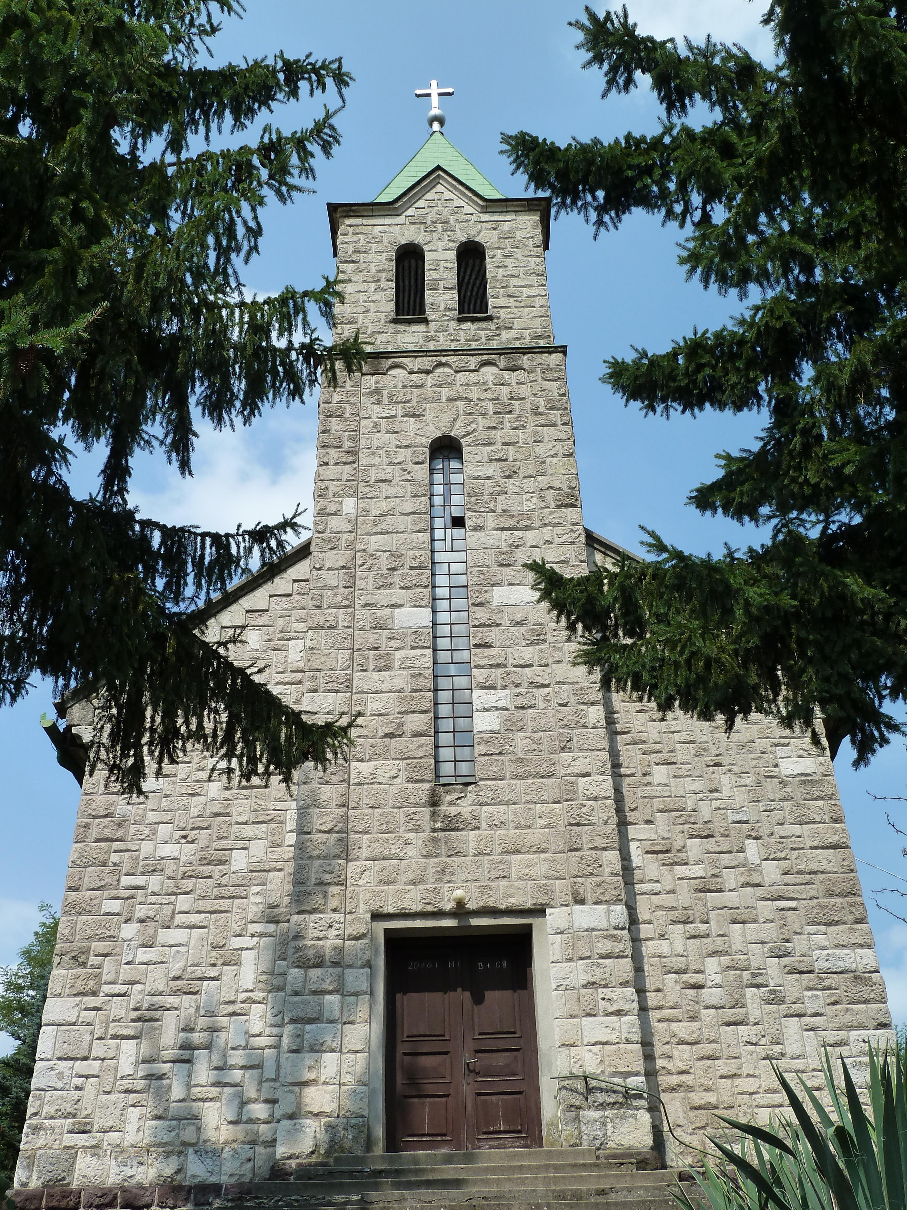 Kisboldogasszony római katolikus templom, Cserhátszentiván